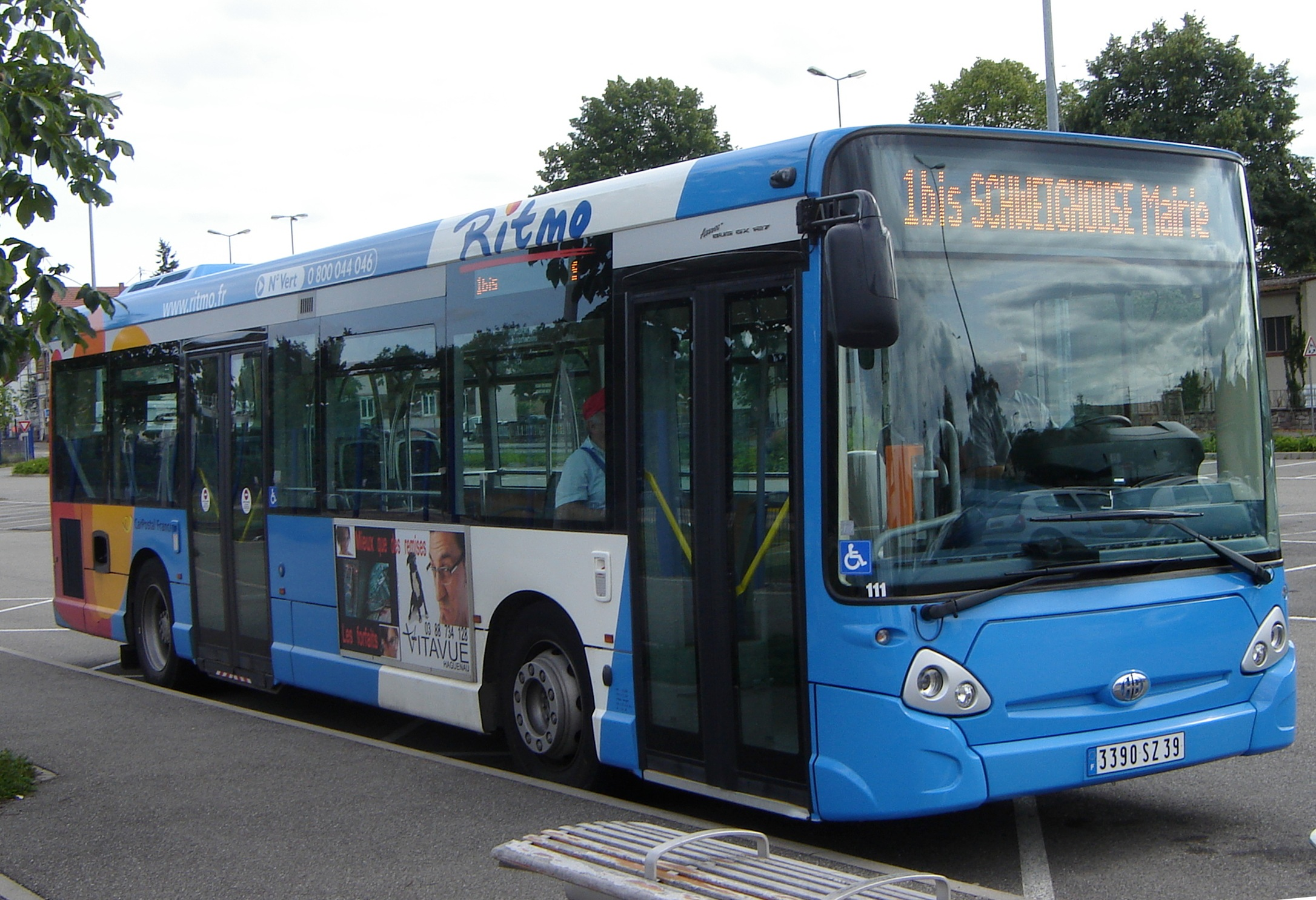 Heuliez GX 127 L du réseau RITMO d'Haguenau